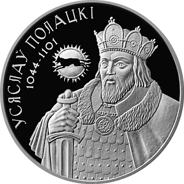 Серебряная монета Всеслав Полоцкий. Реверс